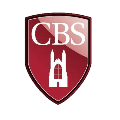 Znak Cambridge Business School